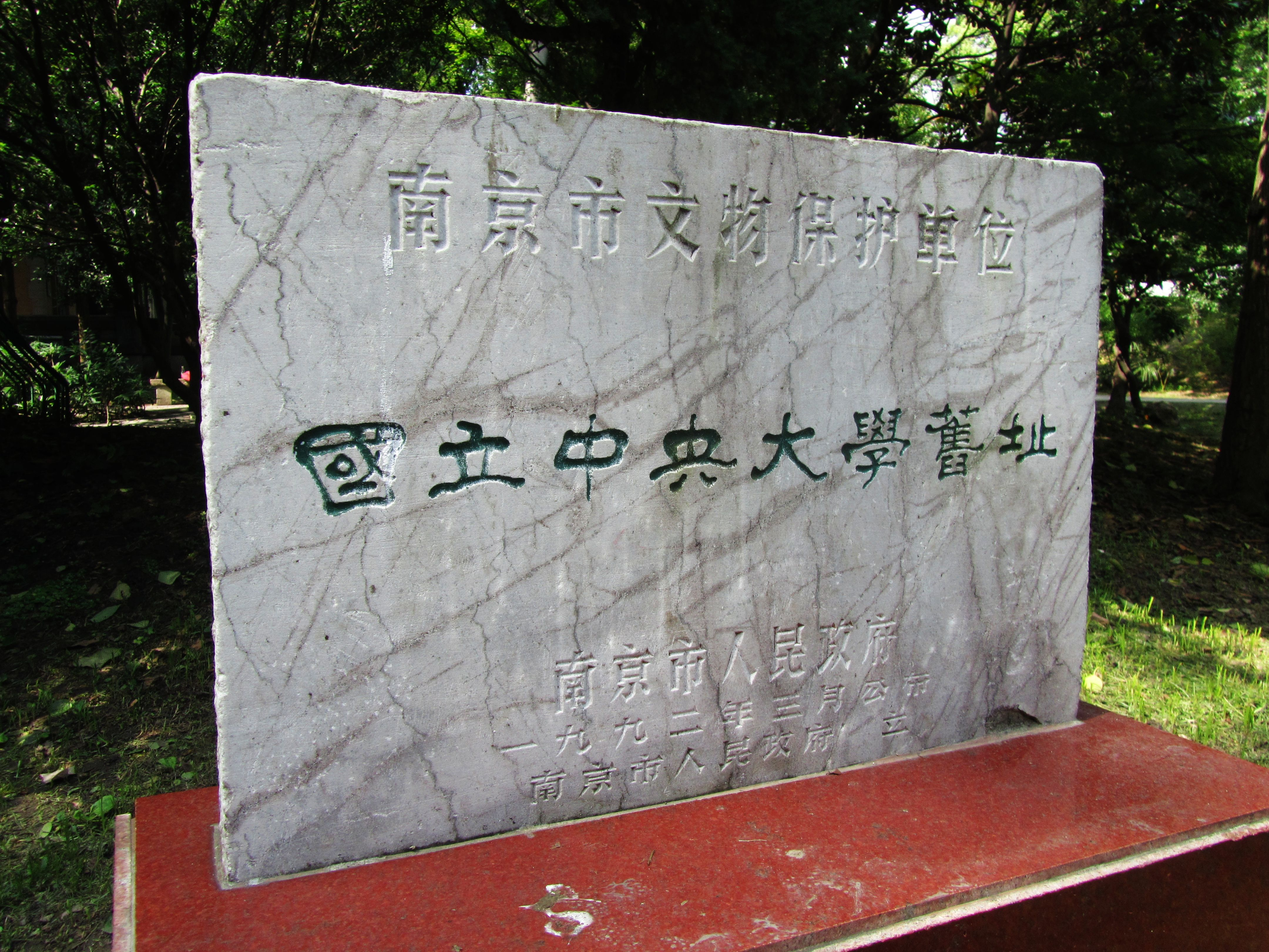 位于南京市东南大学四牌楼校区西北角、六朝松南侧的原国立中央大学旧址南京市文物保护单位标识碑。